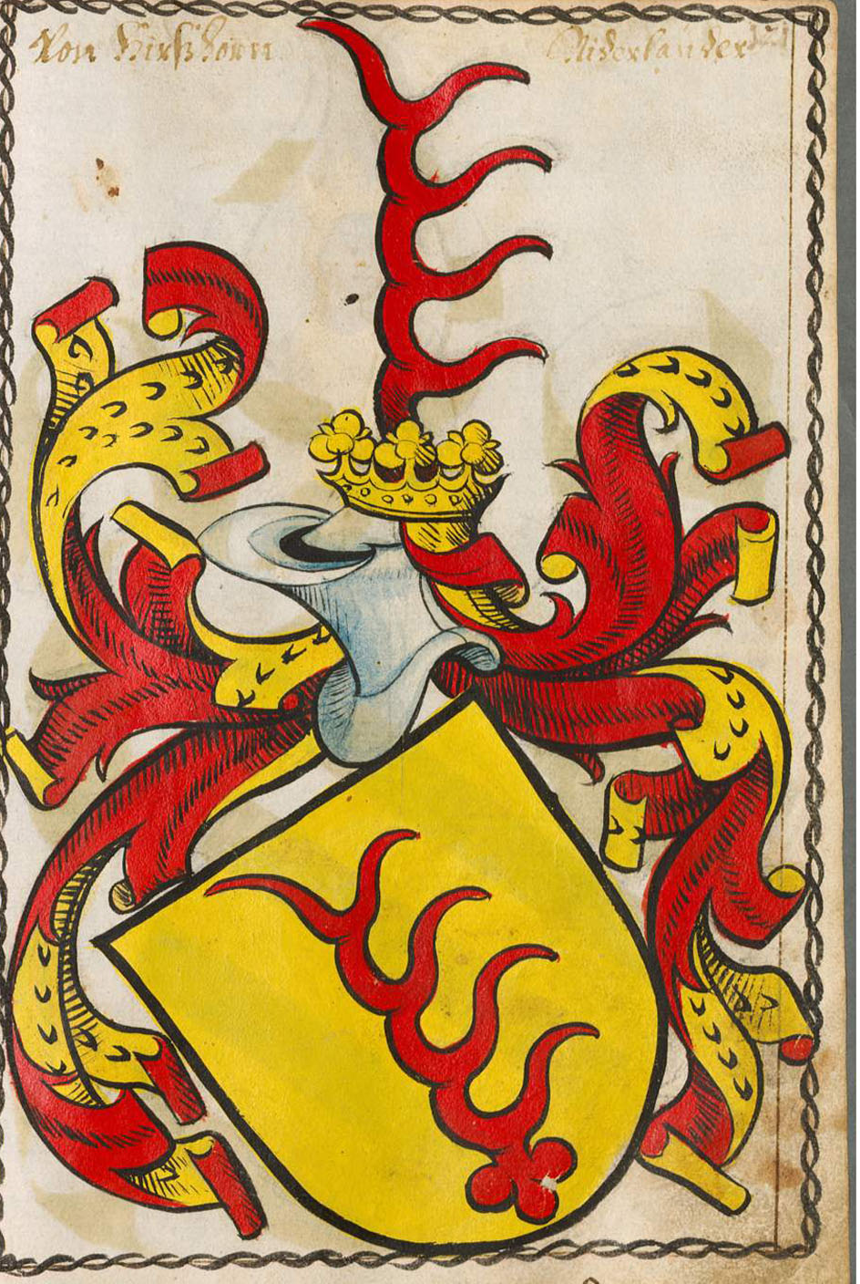 Scheibler'sches Wappenbuch , älterer Teil "Nieferländer" Hieschhorn